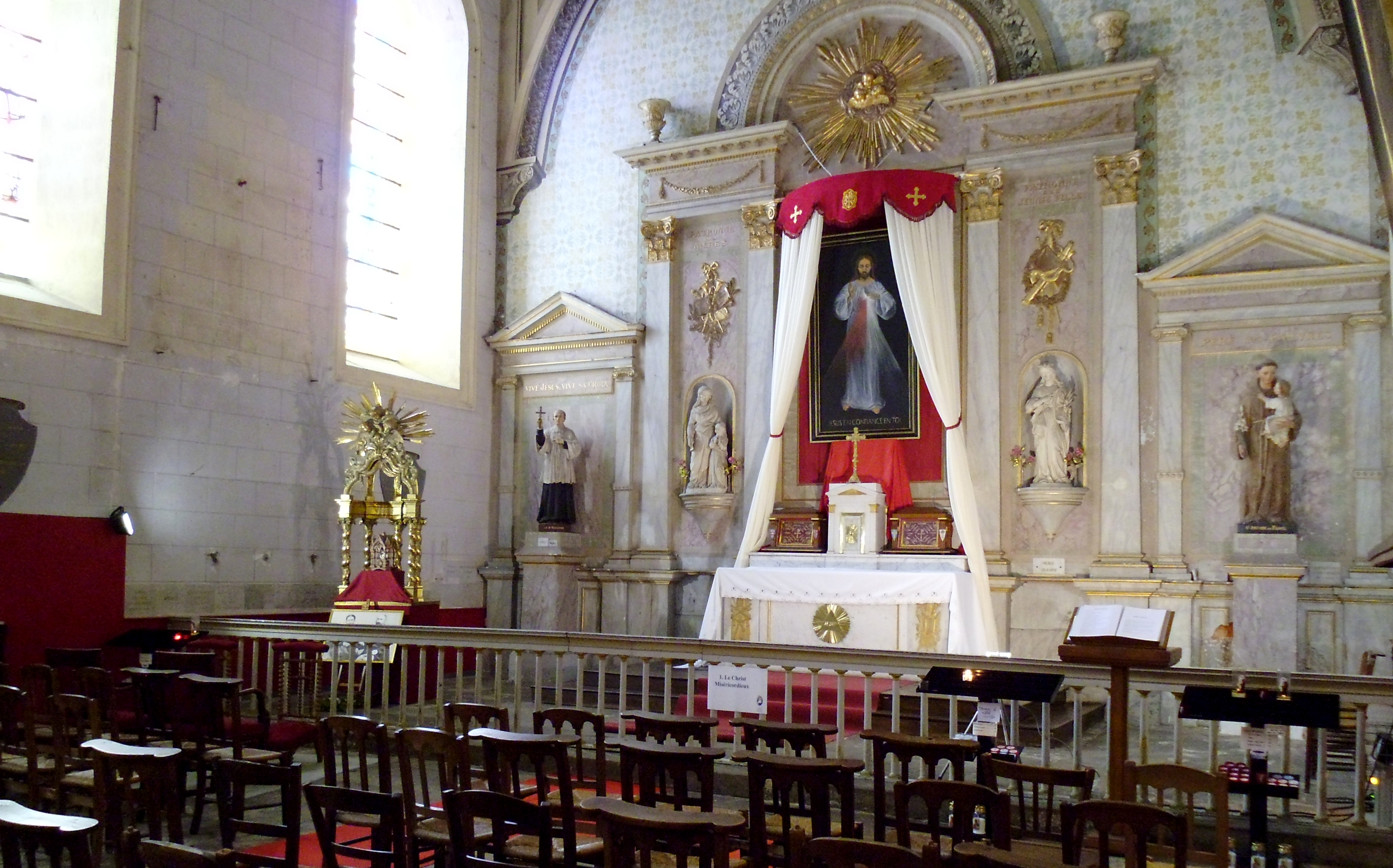 Église Saint-Louis de La Roche-sur-Yon chapelle Saint-Lienne.